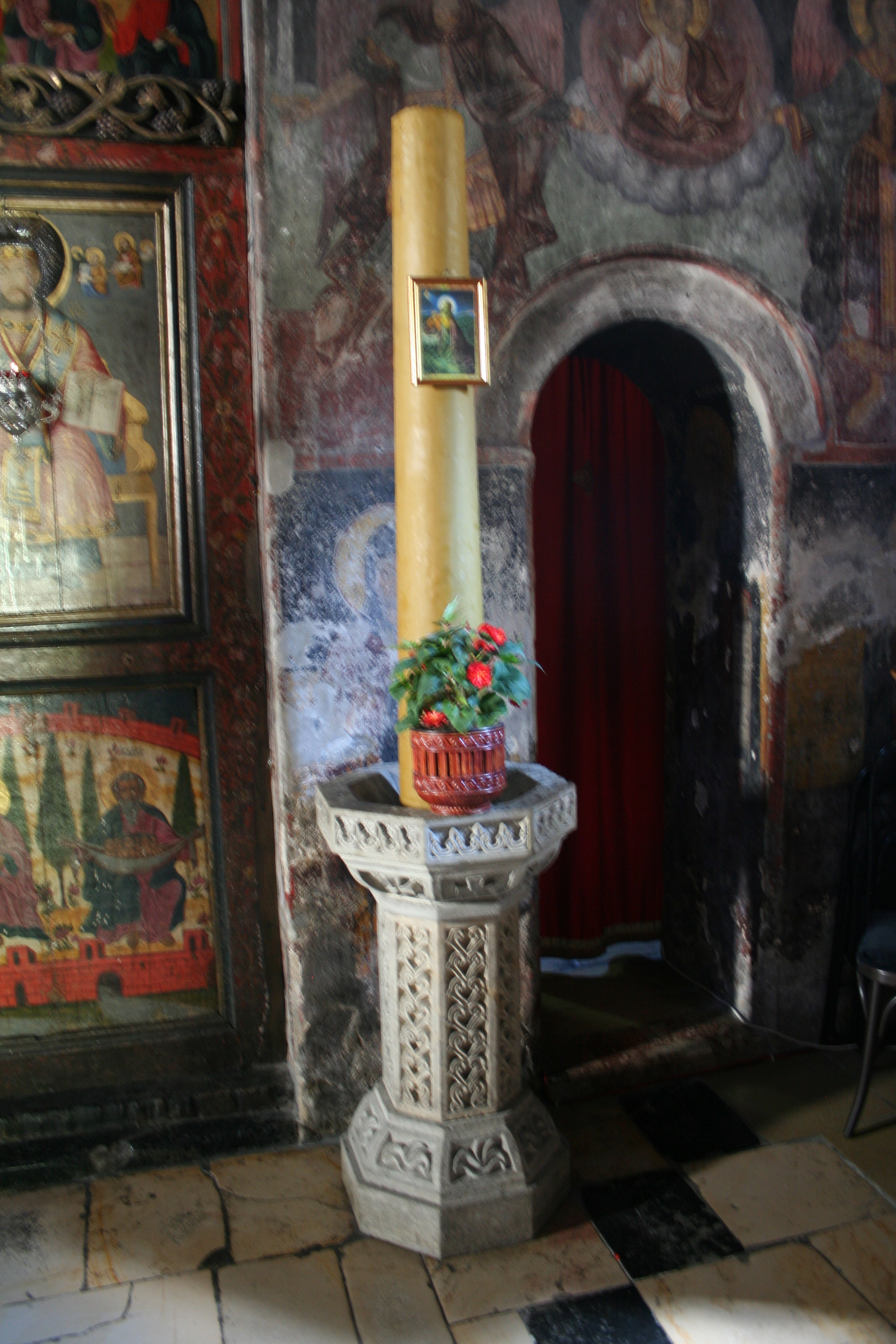 Manastir Tronoša